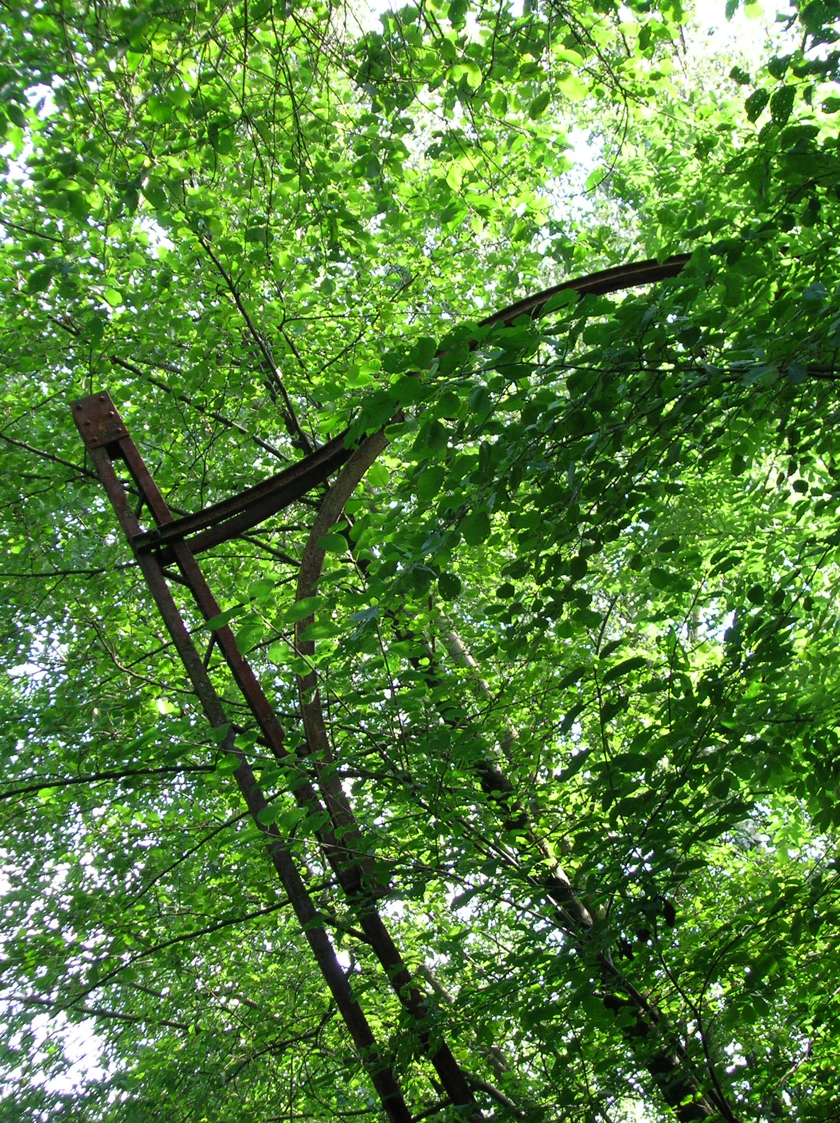 Oberleitungsmast der stillgelegten Straßenbahn Esslingen–Nellingen–Denkendorf in Scharnhausen, Stadt Ostfildern.